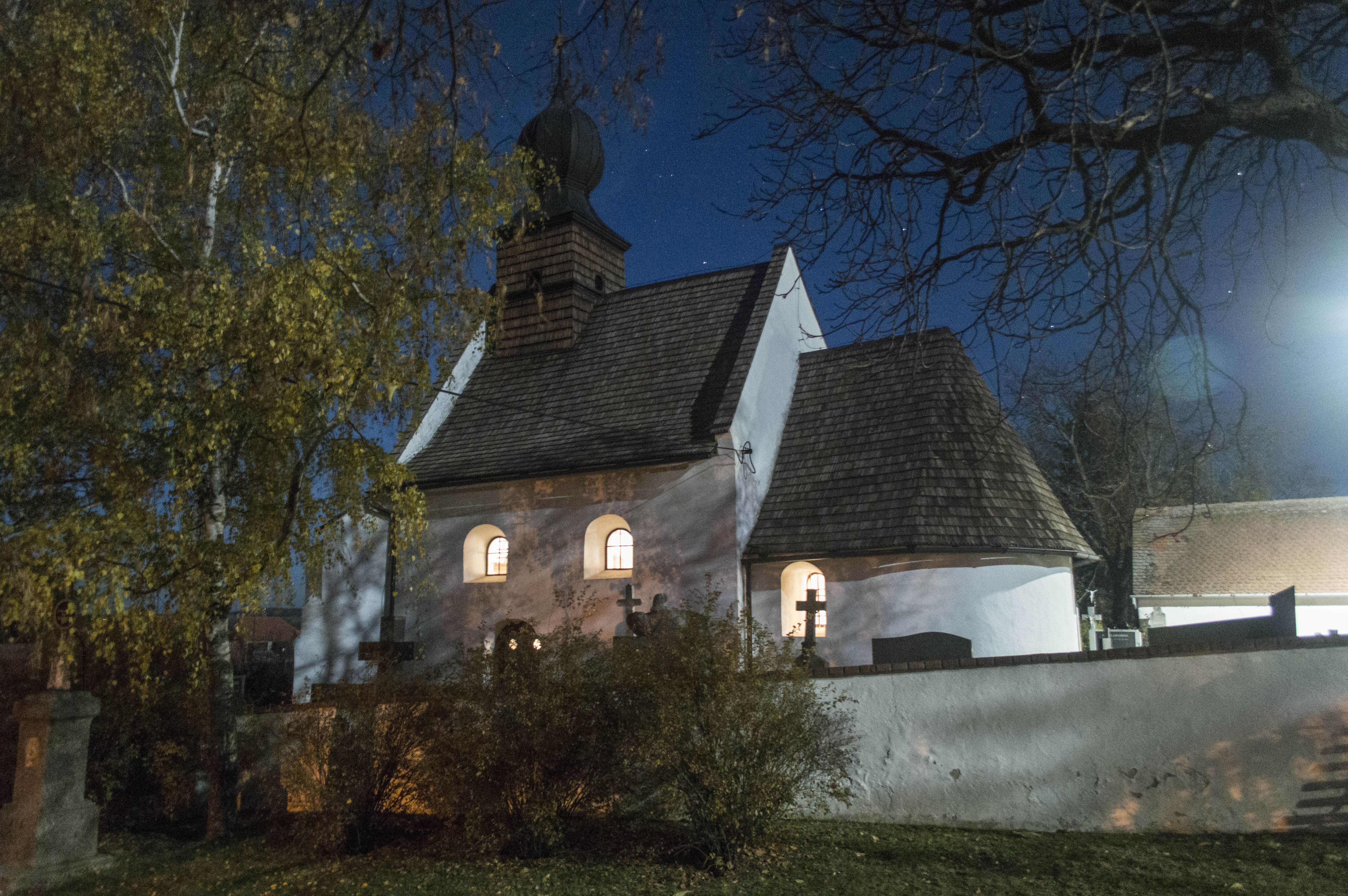 Kostel všech svatých, Přeskače. V noci.